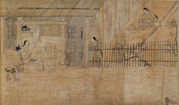 Scène de vie rurale dans le 3e rouleau du Shigisan engi emaki